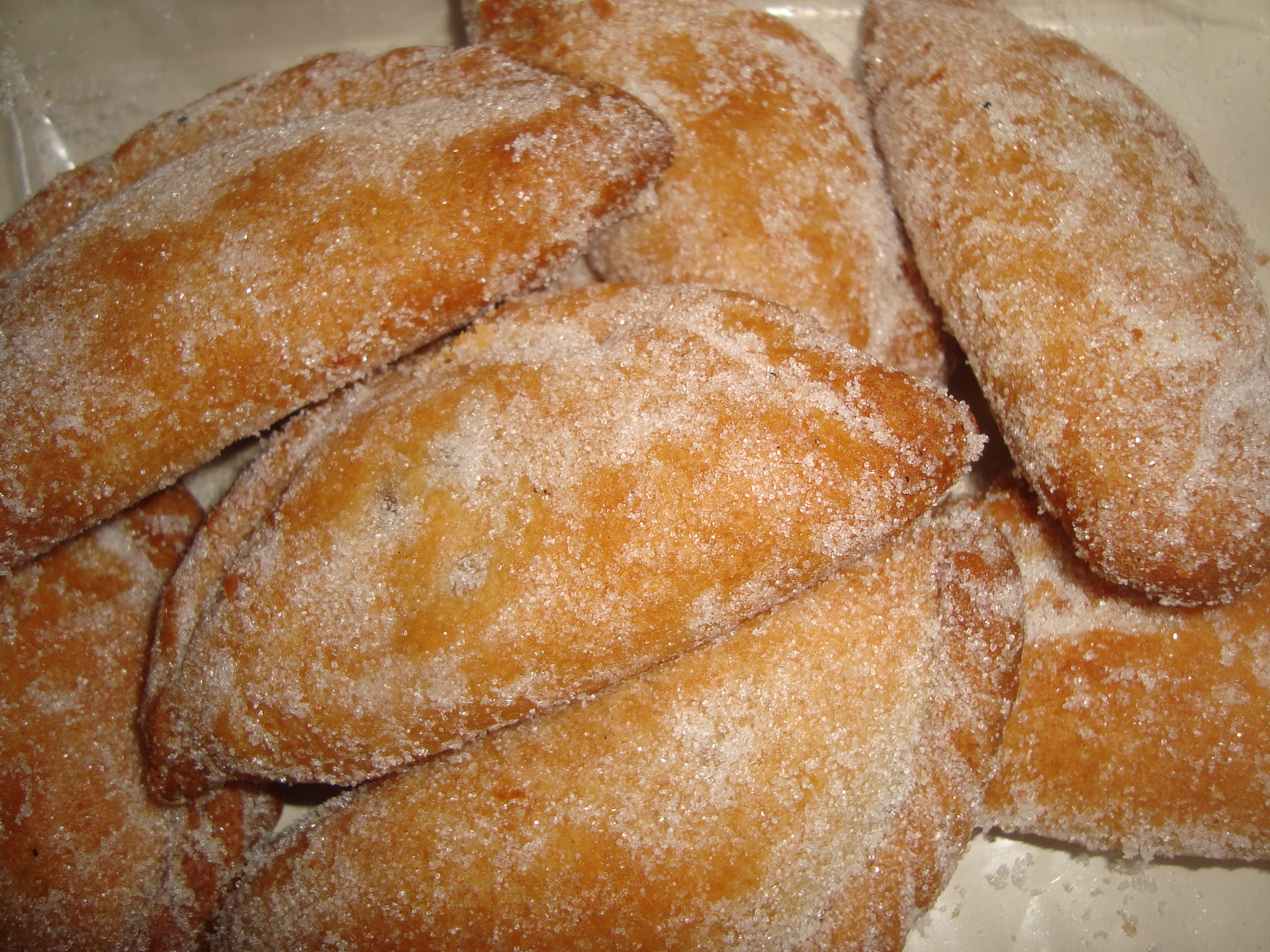 Pastissets de Benifallet (Tarragona)